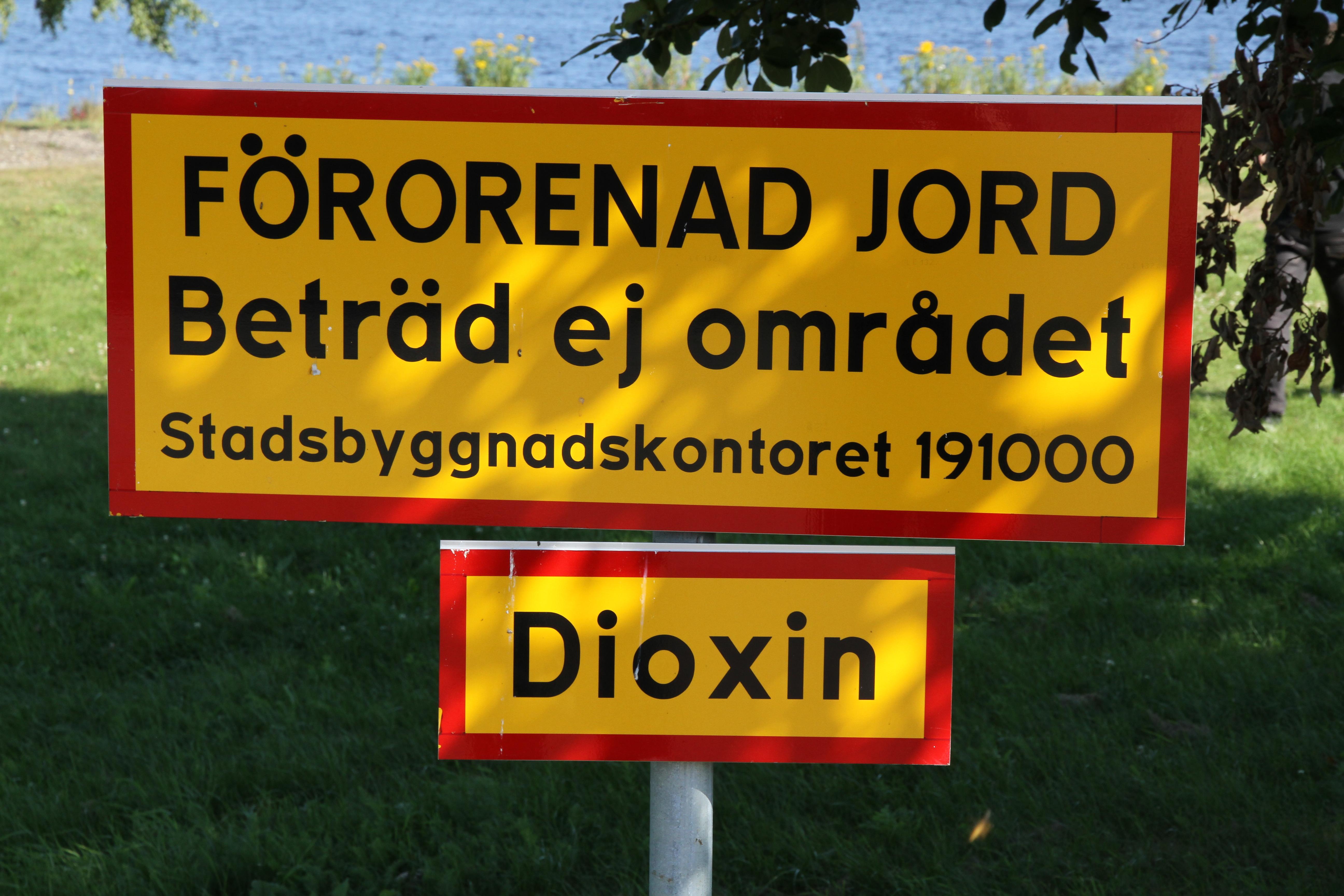 Varningsskylt Dioxin, Svartvik, Sundsvall 3 augusti 2011